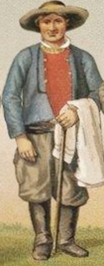 Homme de Saint-Goazec : on n'y trouve pas l'unité de couleur des vêtements portés par les hommes de Pleyben, mais tout aussi est en drap, y compris les guêtres.